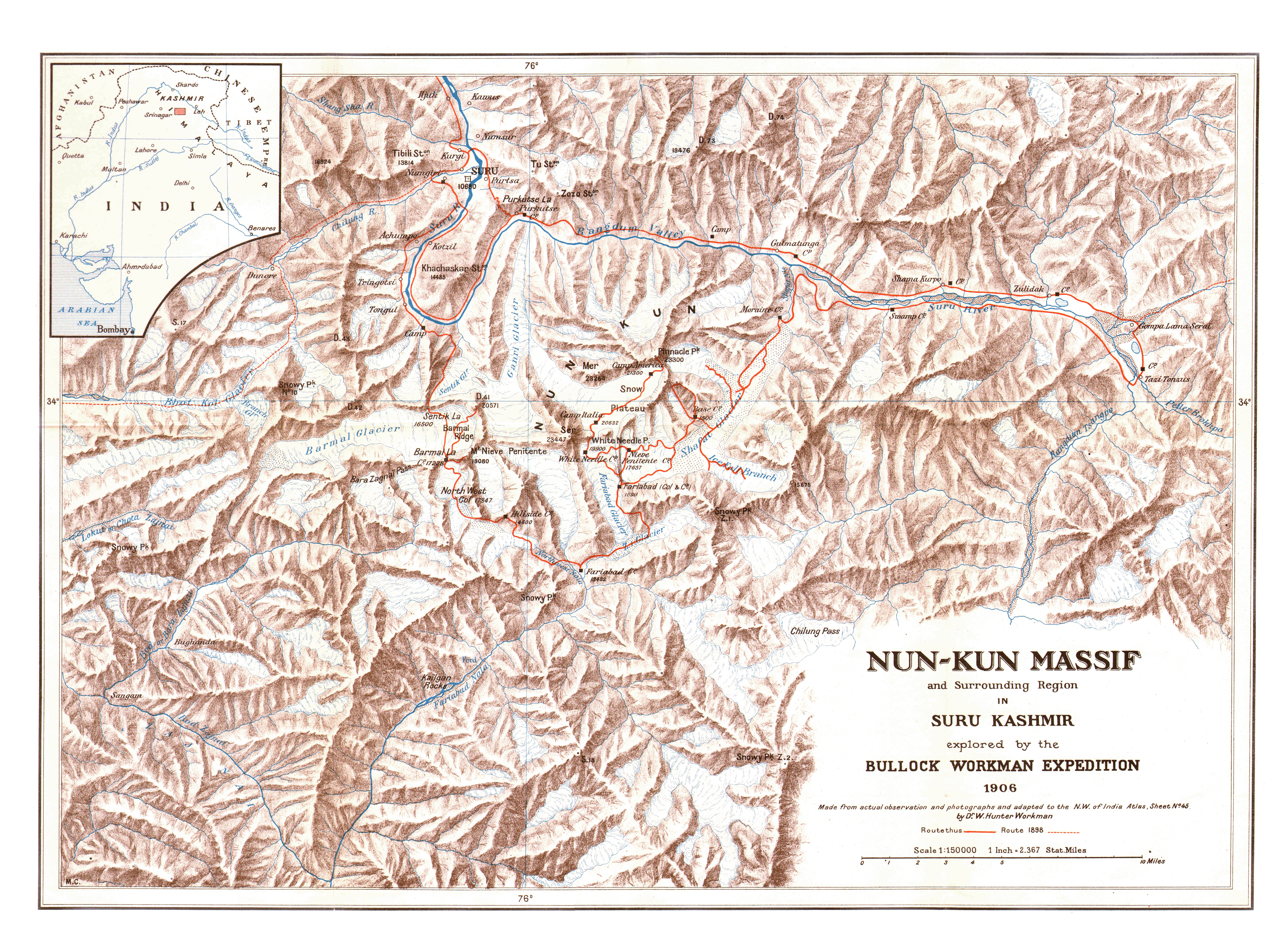 Karte des Nun-Kun Massivs (1:150000) erstellt 1906 von Dr. William Hunter Workman anlässlich der Bullock Workman Expedition, der Umrundung des Nun-Kun-Massivs und der Erstbesteigung des Pinnacle Peak. Veröffentlicht von der Royal Geographical Society, London 1908.